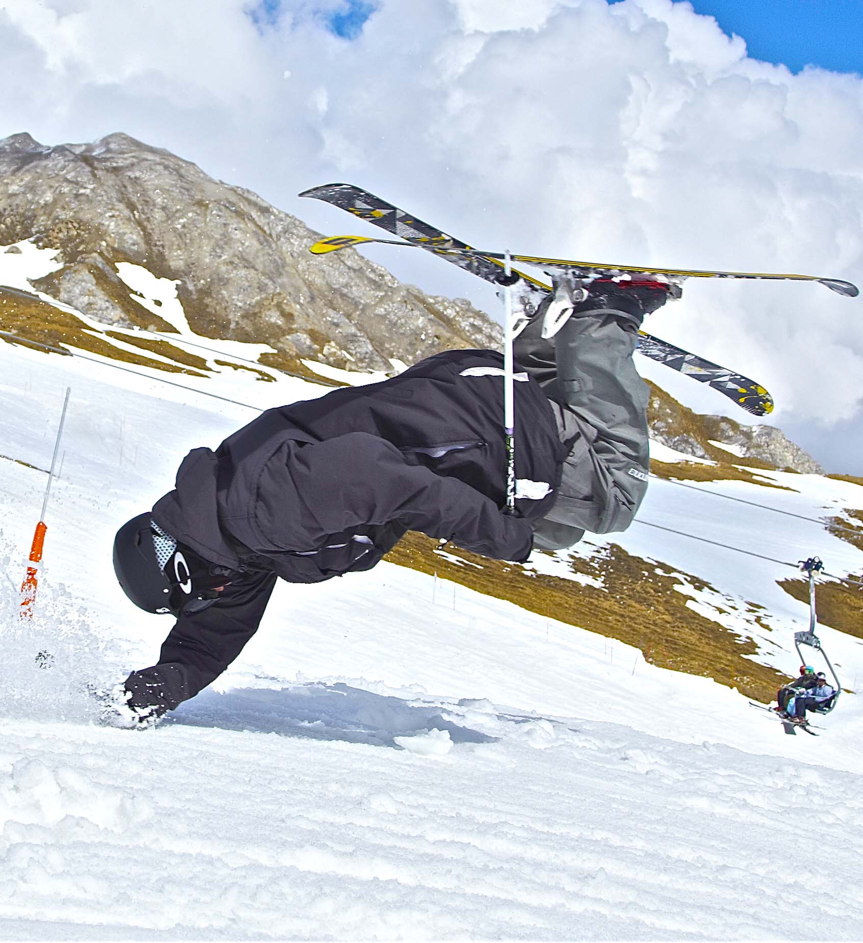 Hand drag during Freestyle Academy in tignes